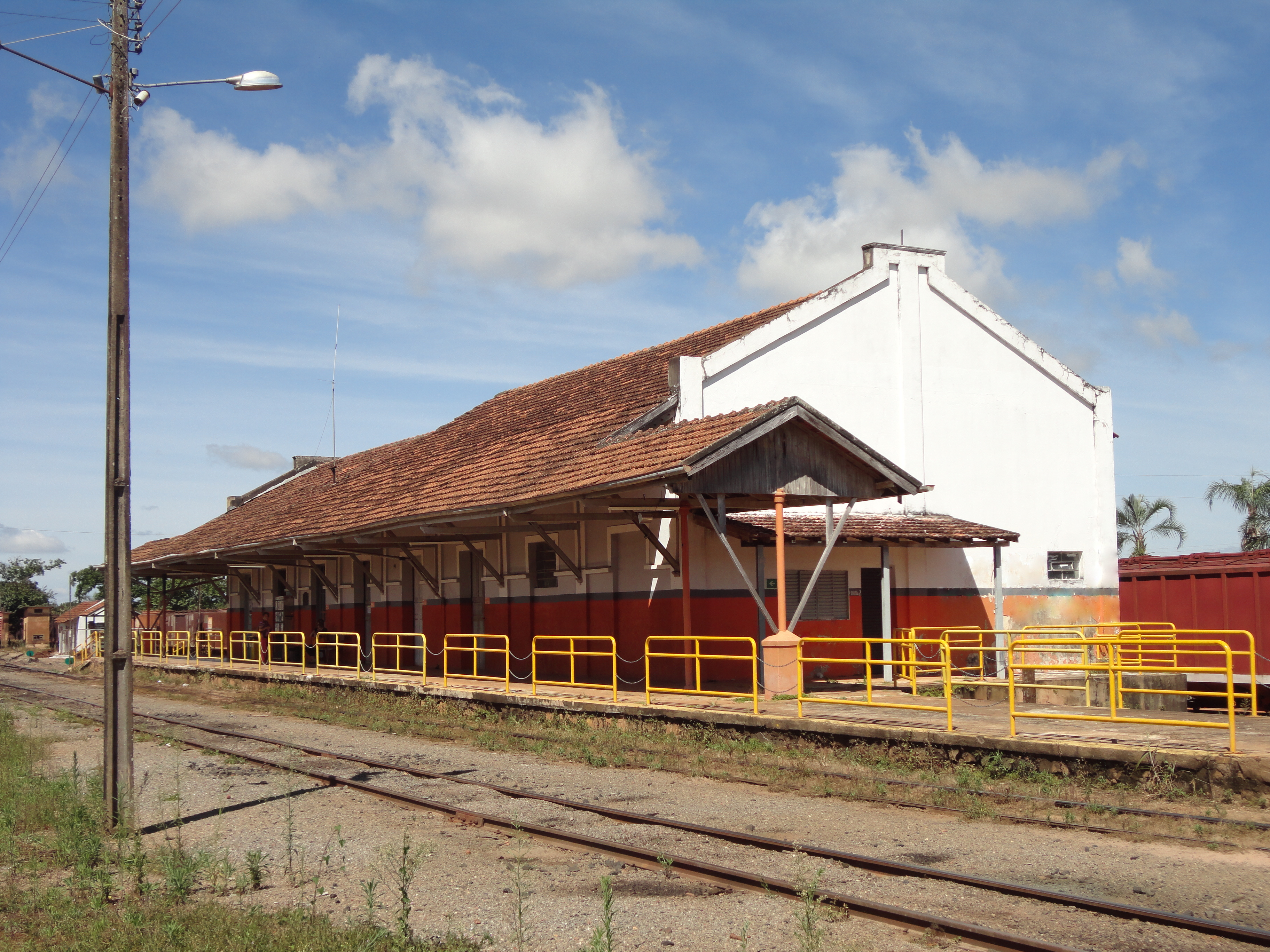 Leopoldo de Bulhoes Train Station